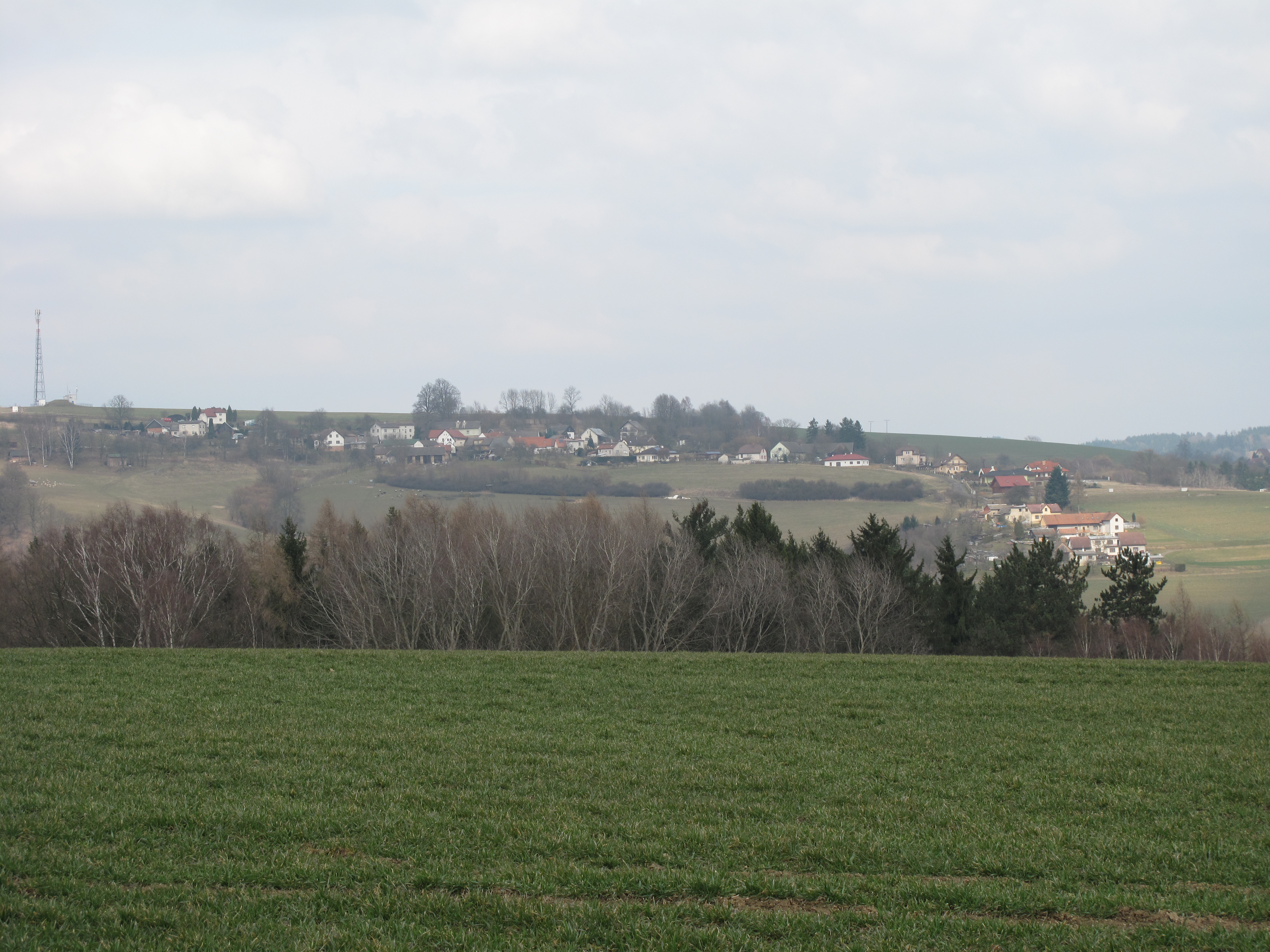 Obrvaň od jihu. Okres Havlíčkův Brod, Česká republika.